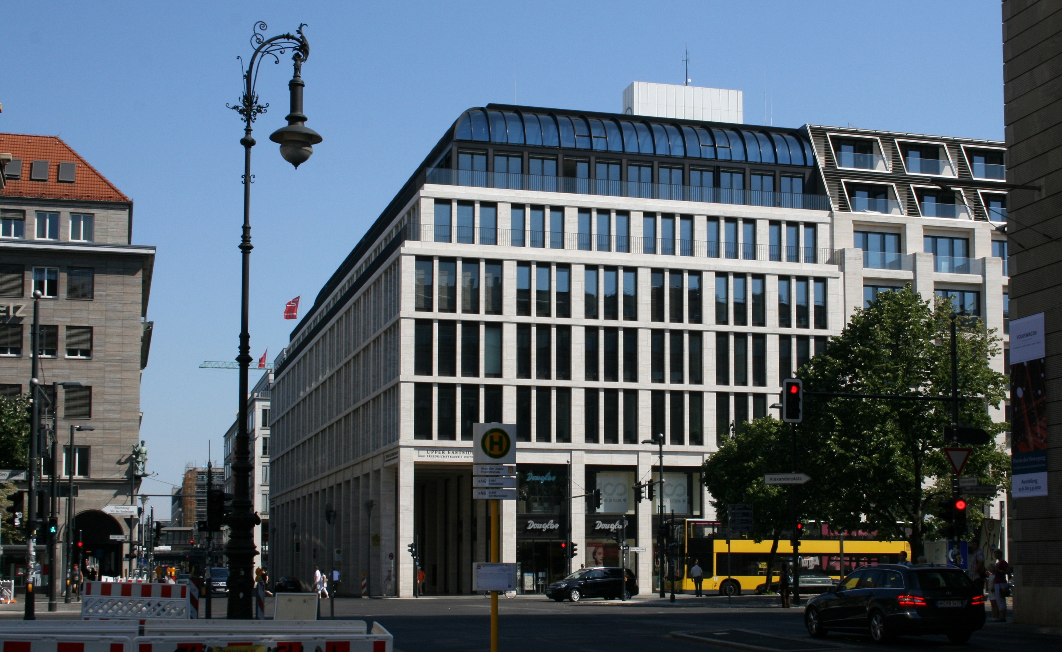 Berlin, Ecke Friedrichstraße/Unter den Linden: Büro- und Geschäftshaus Friedrichstraße 88-89, Teil des Komplexes "Upper Eastside Berlin"; erbaut 2007/2008. Vorher stand an dieser Stelle das Hotel "Unter den Linden" (2006 abgerissen).